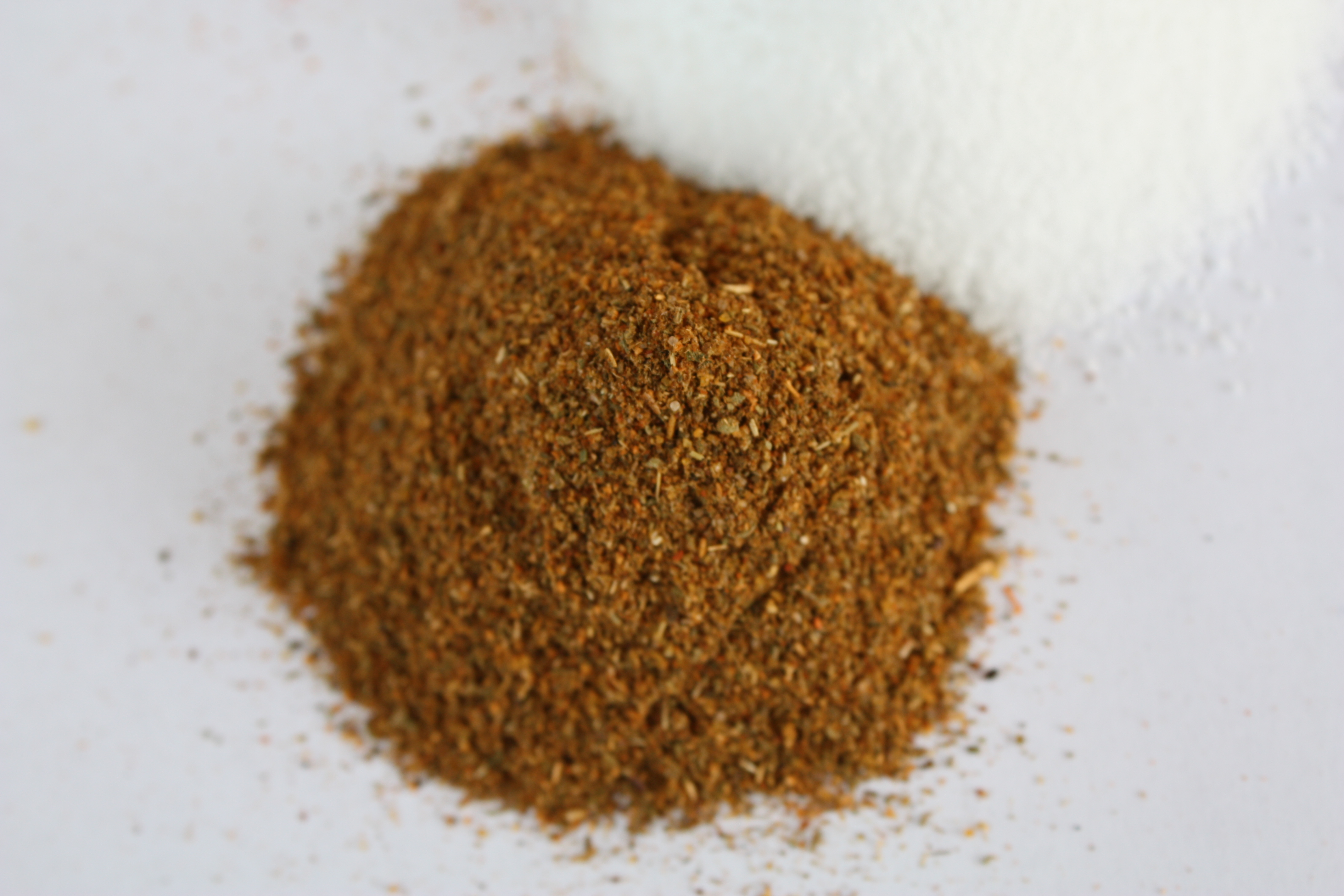 bulgarian spices: Salz und Scharene sol (in Detuschland fälchlicherweise Tschubriza) und Paprikagewürz, ; шарена сол